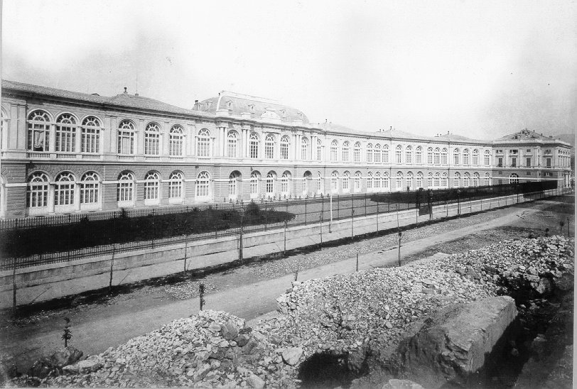 Ospedale Galliera (1888) in Genoa, Italy